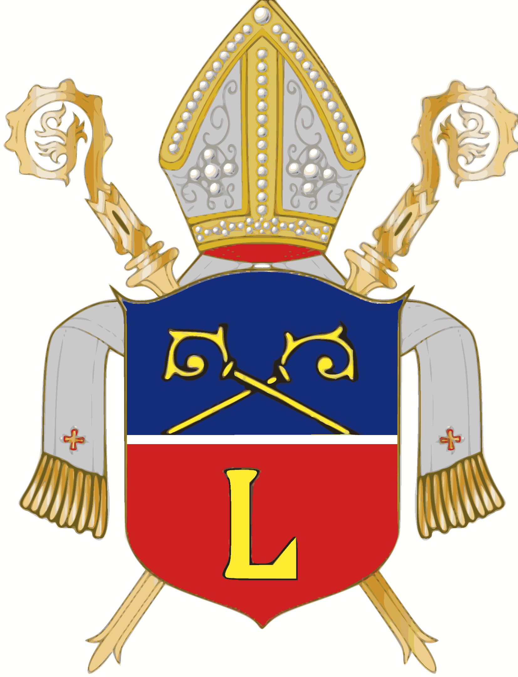 Wappen des Stiftes St. Lambrecht